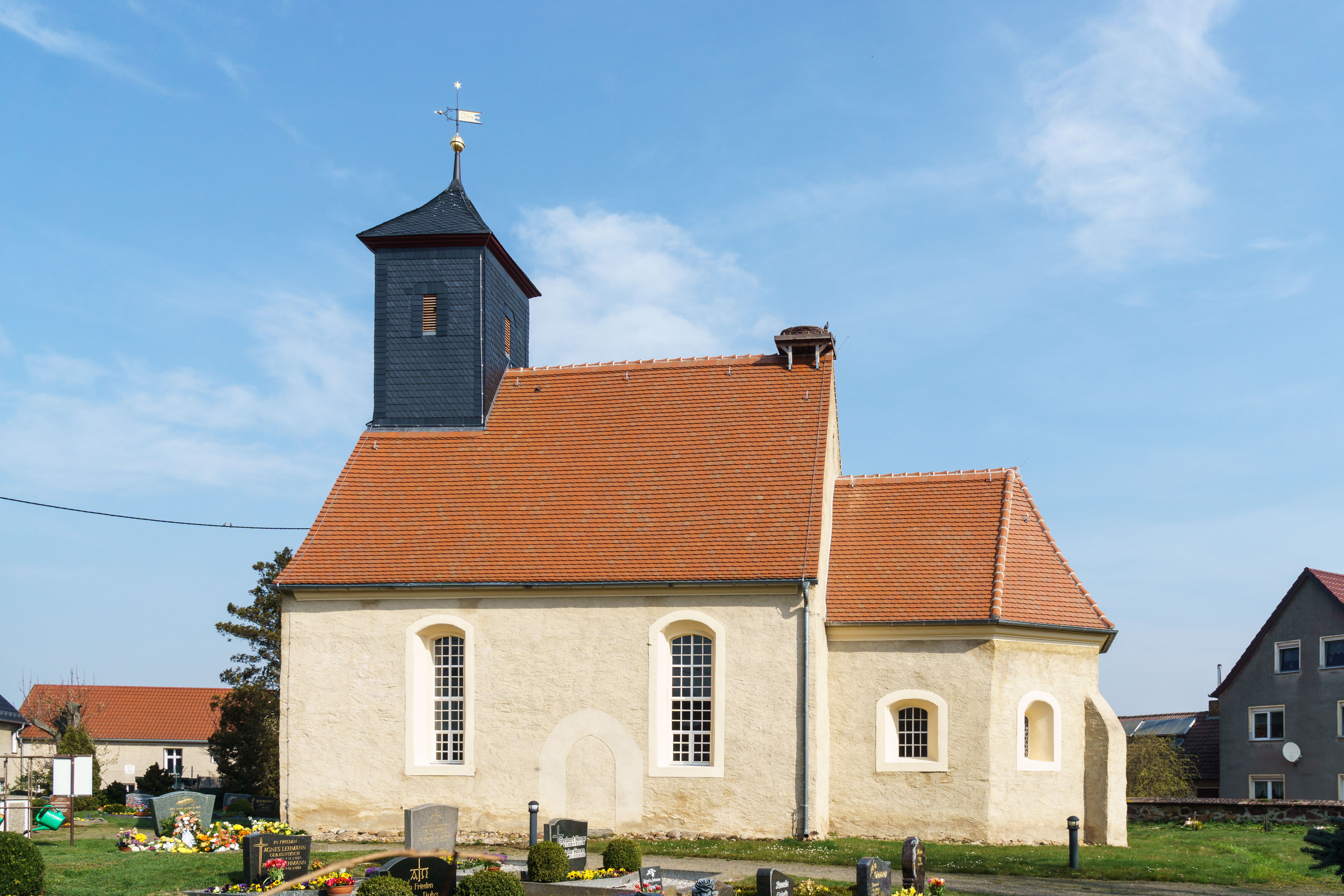 Kirche, Dorfstraße 41a in Torgau OT Staupitz